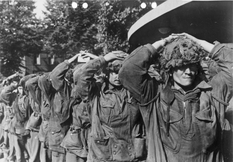 In langen Kolonnen wandern englische Fallschirmjäger, die im brennden Arnheim einen vergeblichen Kampf führten, in die deutsche Gefangenschaft PK-Wenzel